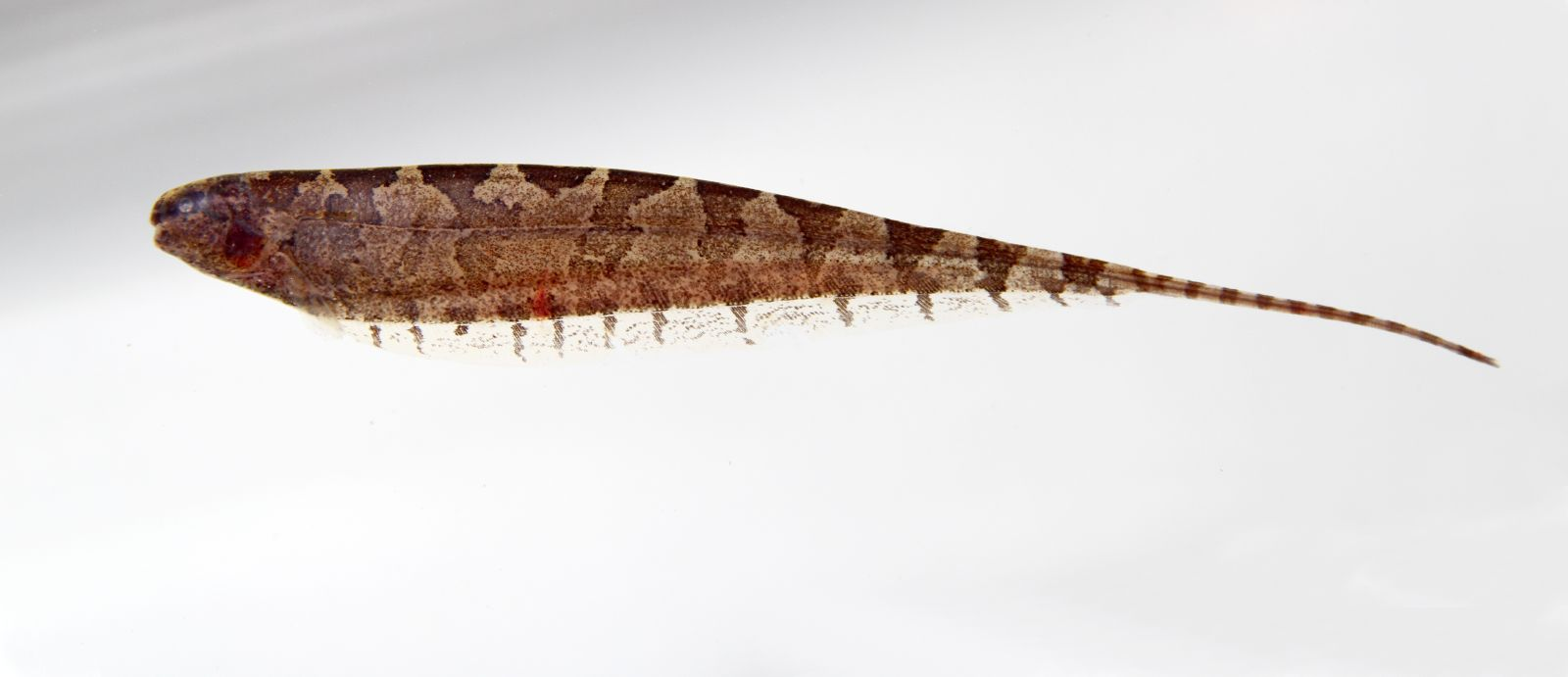 Steatogenys elgans